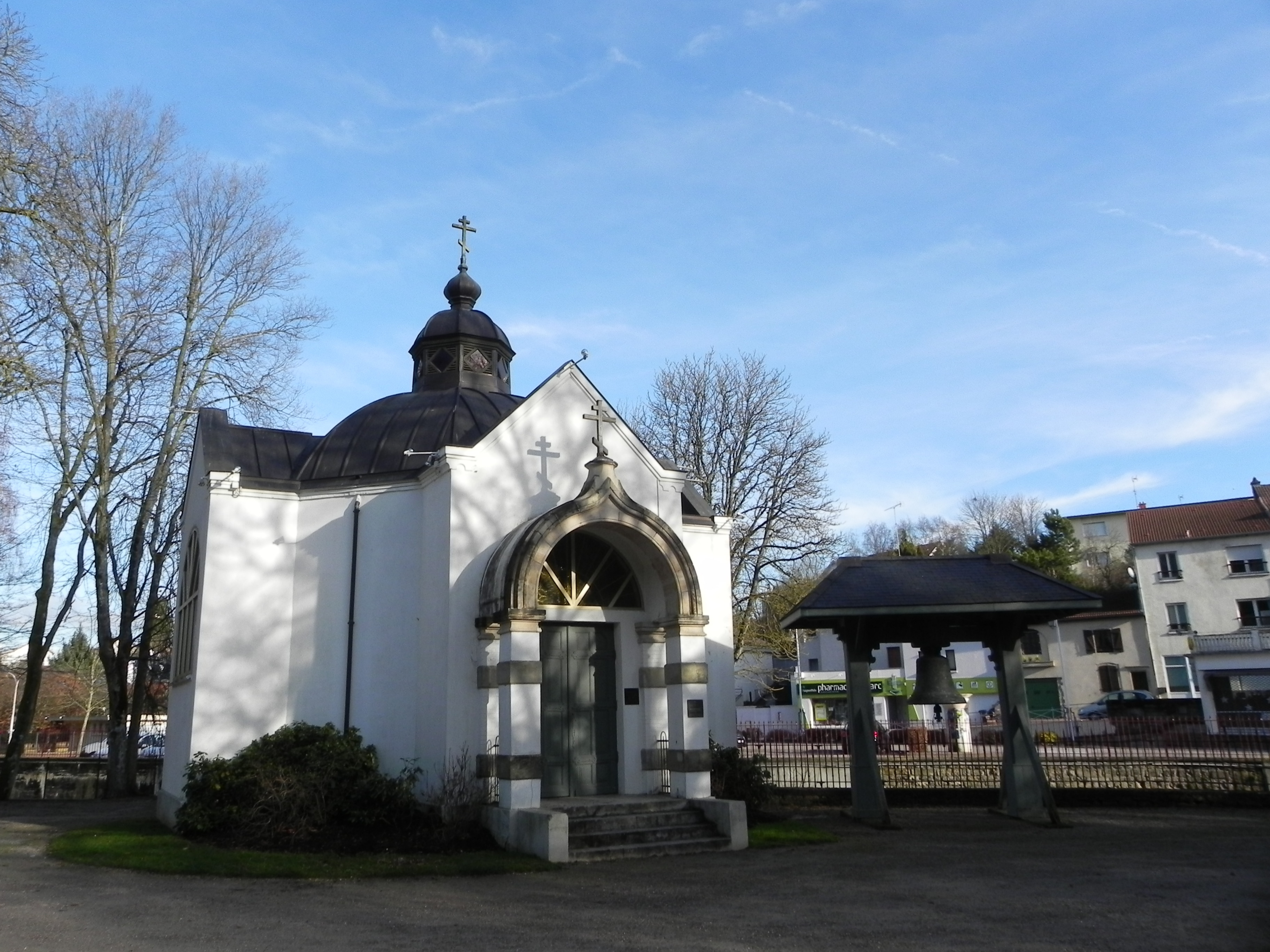 Contrexéville (Vosges)